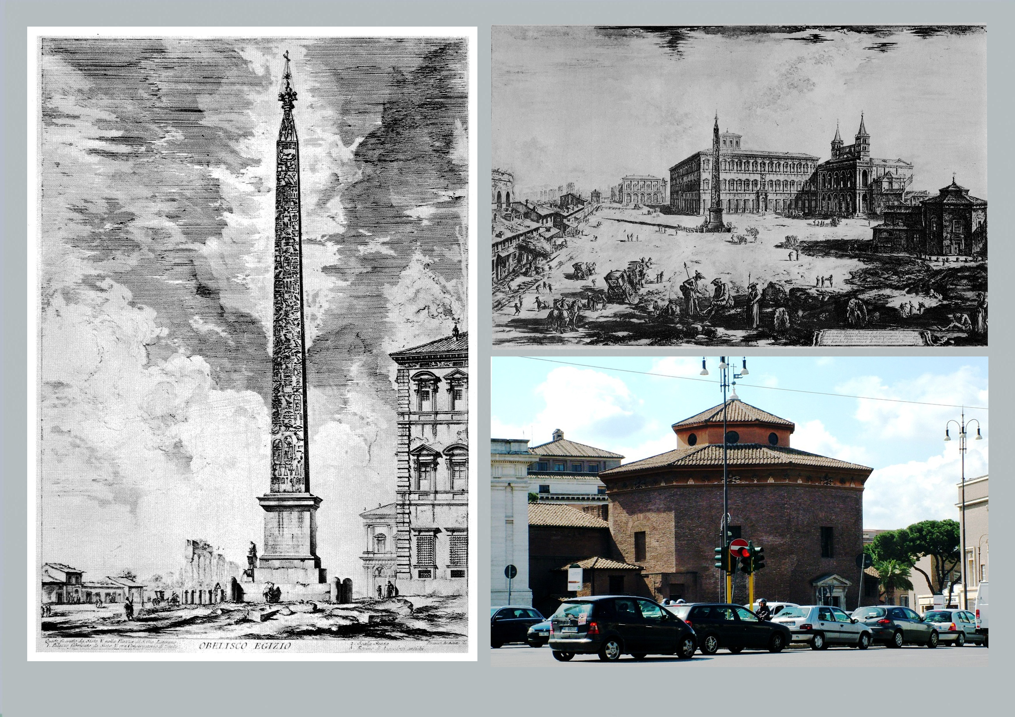 Piranesi vedutái